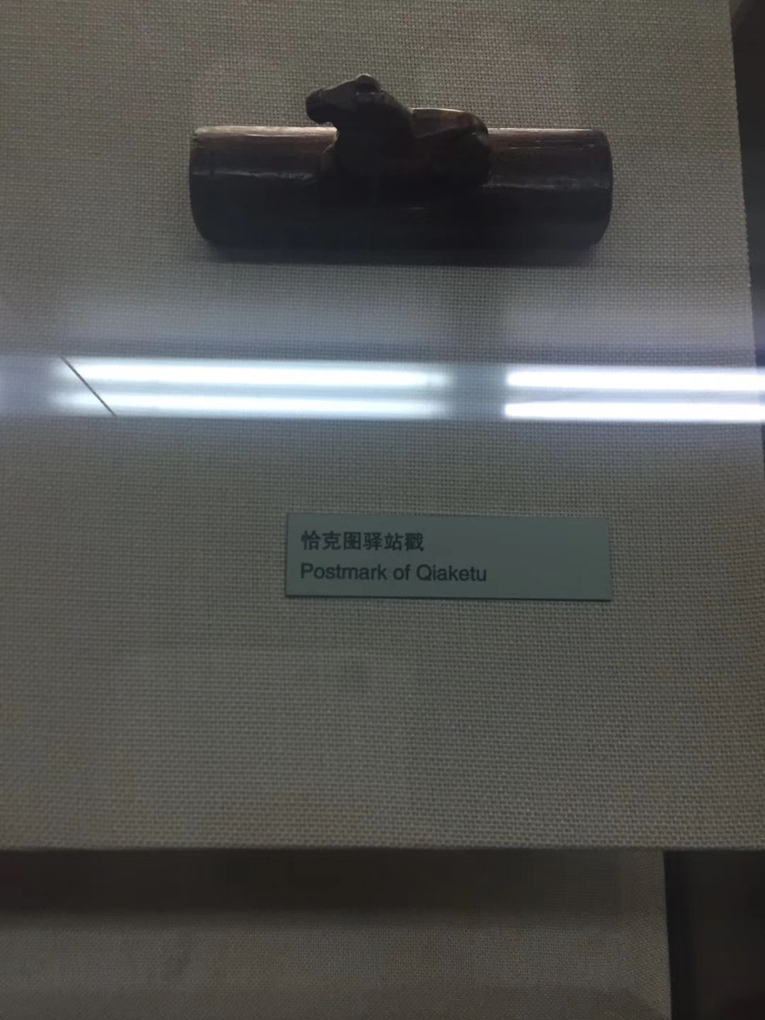 中文（中国大陆）: 天津邮政博物馆馆藏恰克图驿站戳